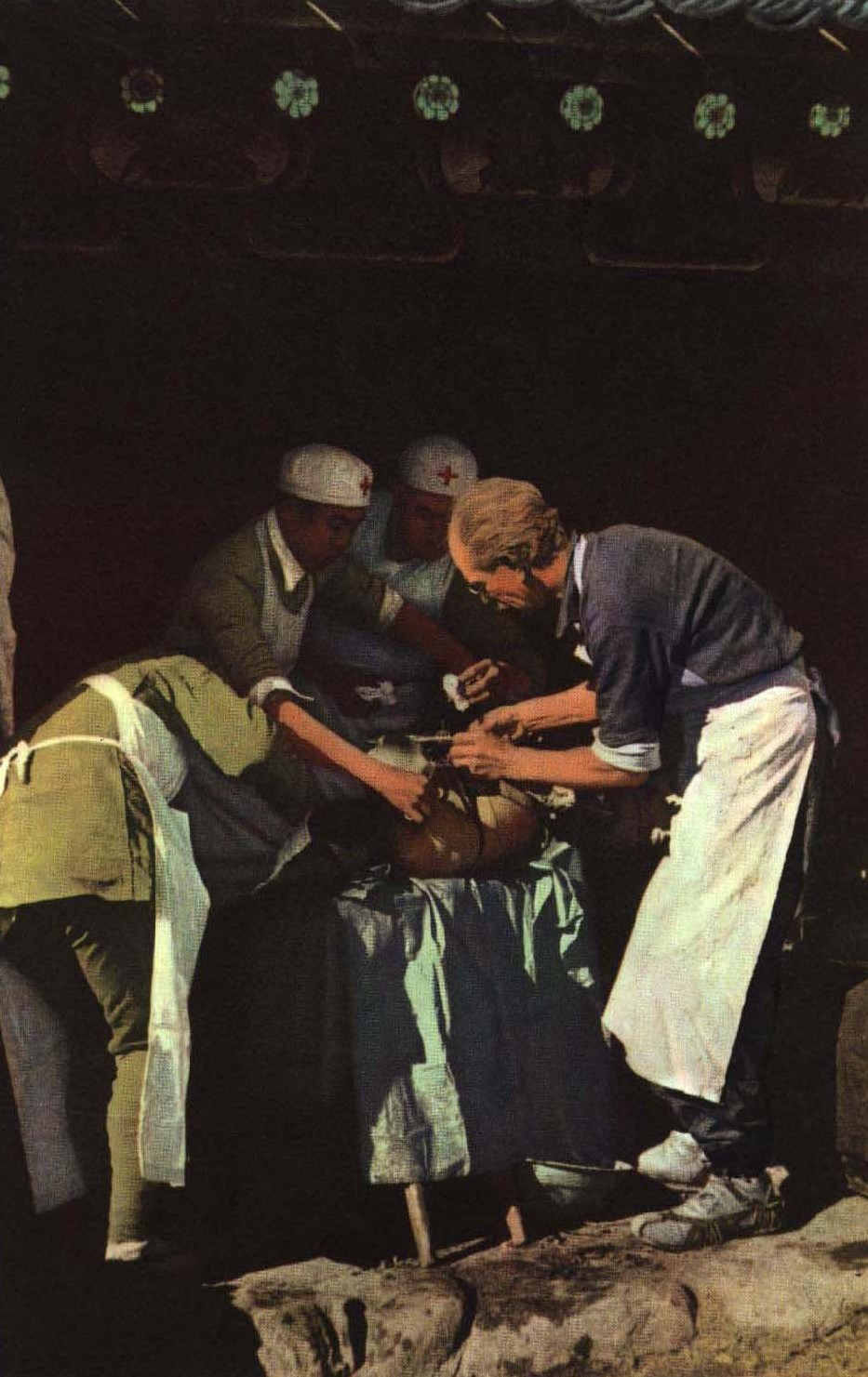 1967-06 1939年10月的白求恩在做手术